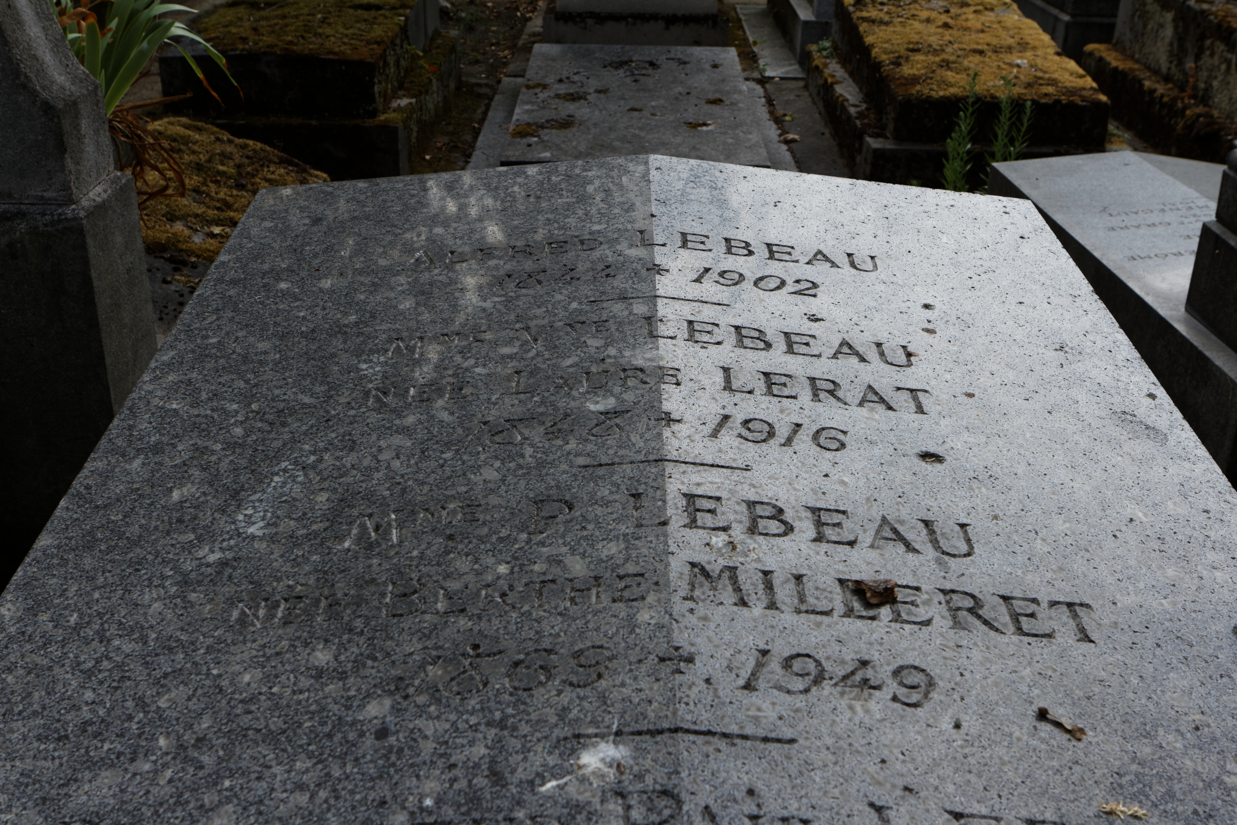 Sépulture de Paul Lebeau (1868-1959), chimiste et académicien des sciences. Il est l'un des principaux artisans de l'élaboration des moyens de protection contre les gaz de combat pendant la Première Guerre mondiale.